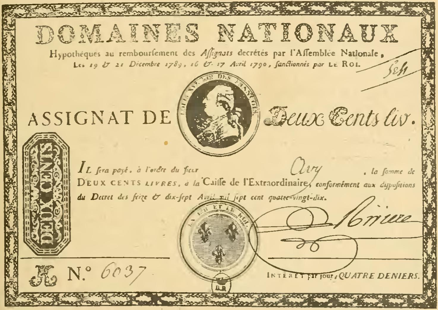 Assignat de 200 livres dans l'Histoire socialiste de la France contemporaine (tome I).